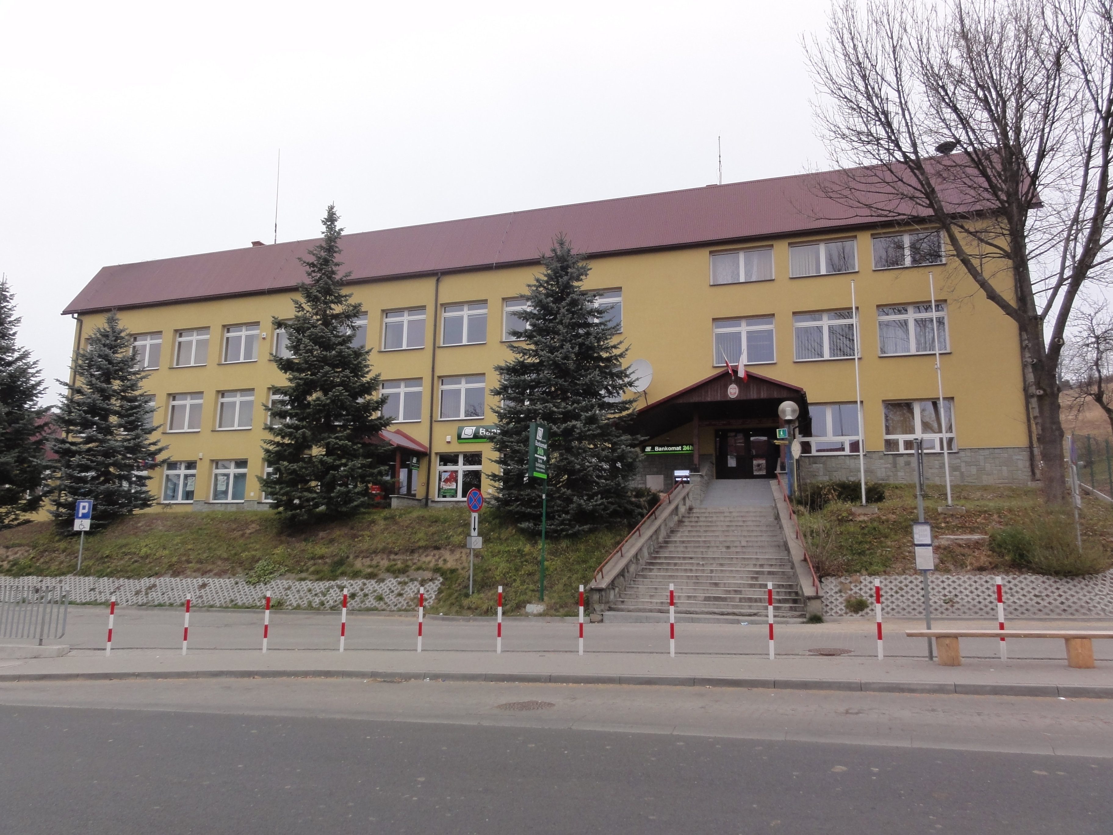 Budynek gminny w Istebnej mieszczący: Radę Gminy, Urząd Gminy, Urząd Stanu Cywilnego, Gminny Ośrodek Pomocy Społecznej, Gminny Zespół do Spraw Oświaty Istebnej, Zespół Dzielnicowy Komisariatu Policji w Wiśle oraz pocztę